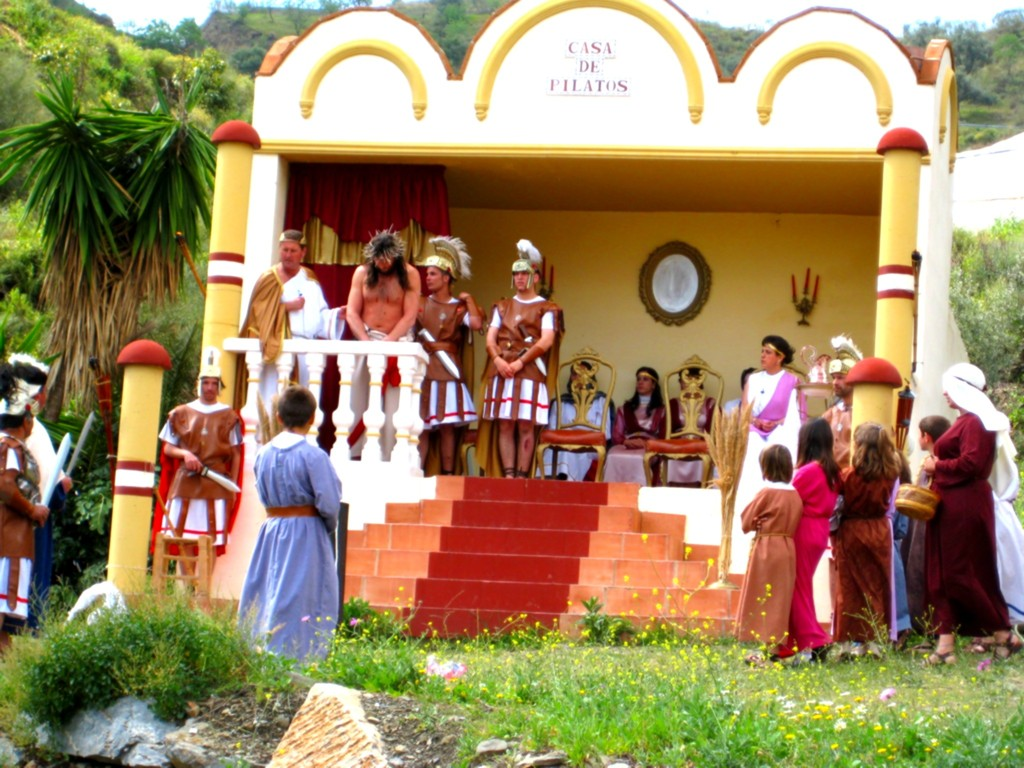 Passionsspiele Cajiz